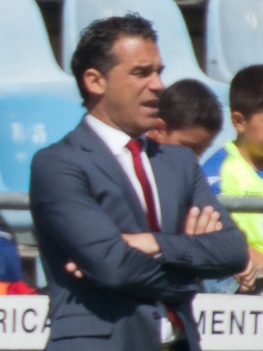 Luis García Plaza (Madrid, España, 1 de diciembre de 1972) es un ex futbolista y entrenador español. Partido celebrado el 21-04-2013 entre el Getafe C.F. - R.C.D. Español correspondiente a La Liga.